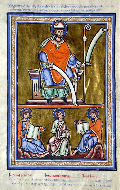 Gilbert de la Porrée enseignant et disciples Noms des disciples rubriqués : Jourdain Fantosme, Yves de Chartres et Jean Beleth.